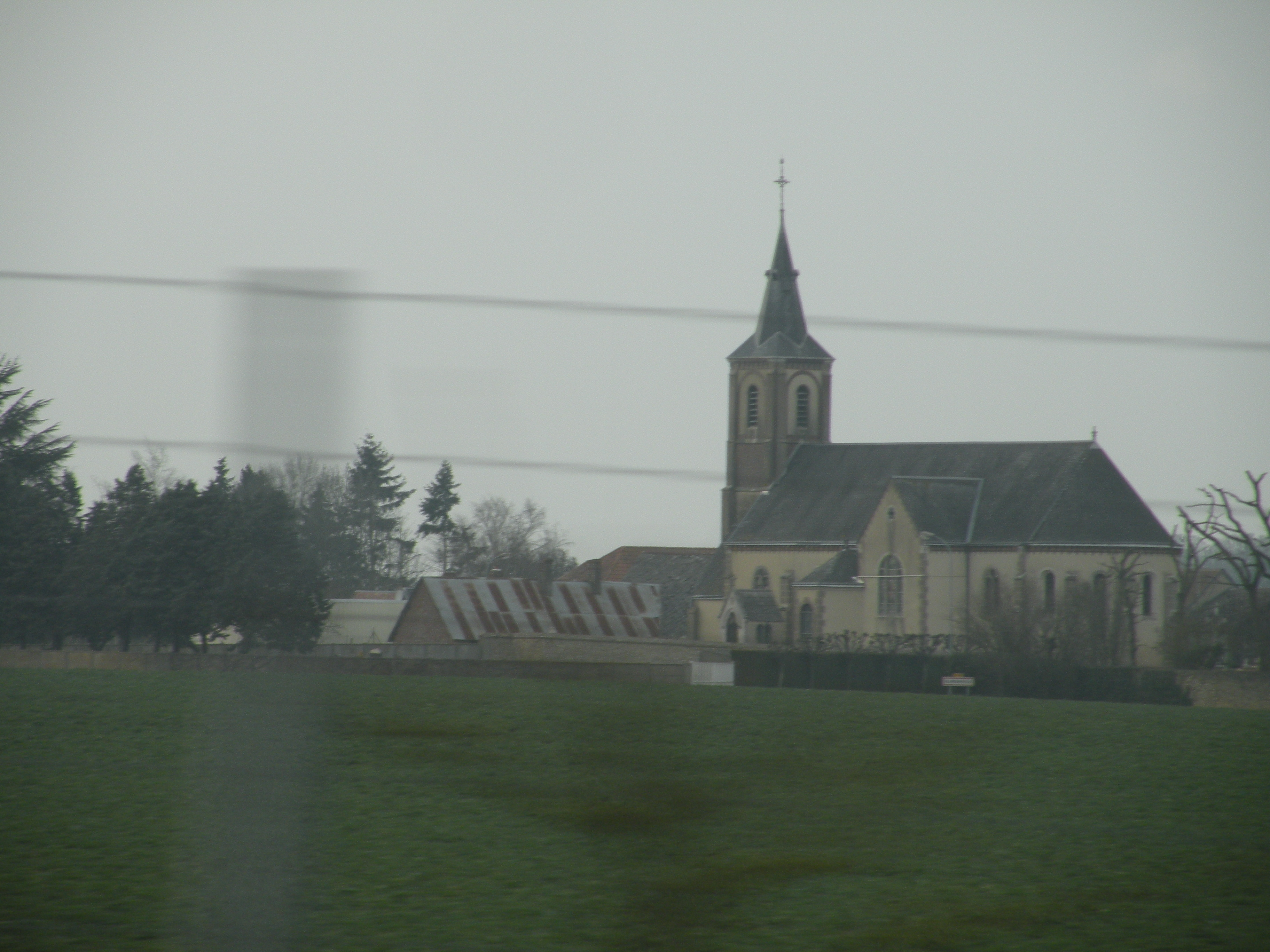 Blandainville vue depuis l'autoroute A11.